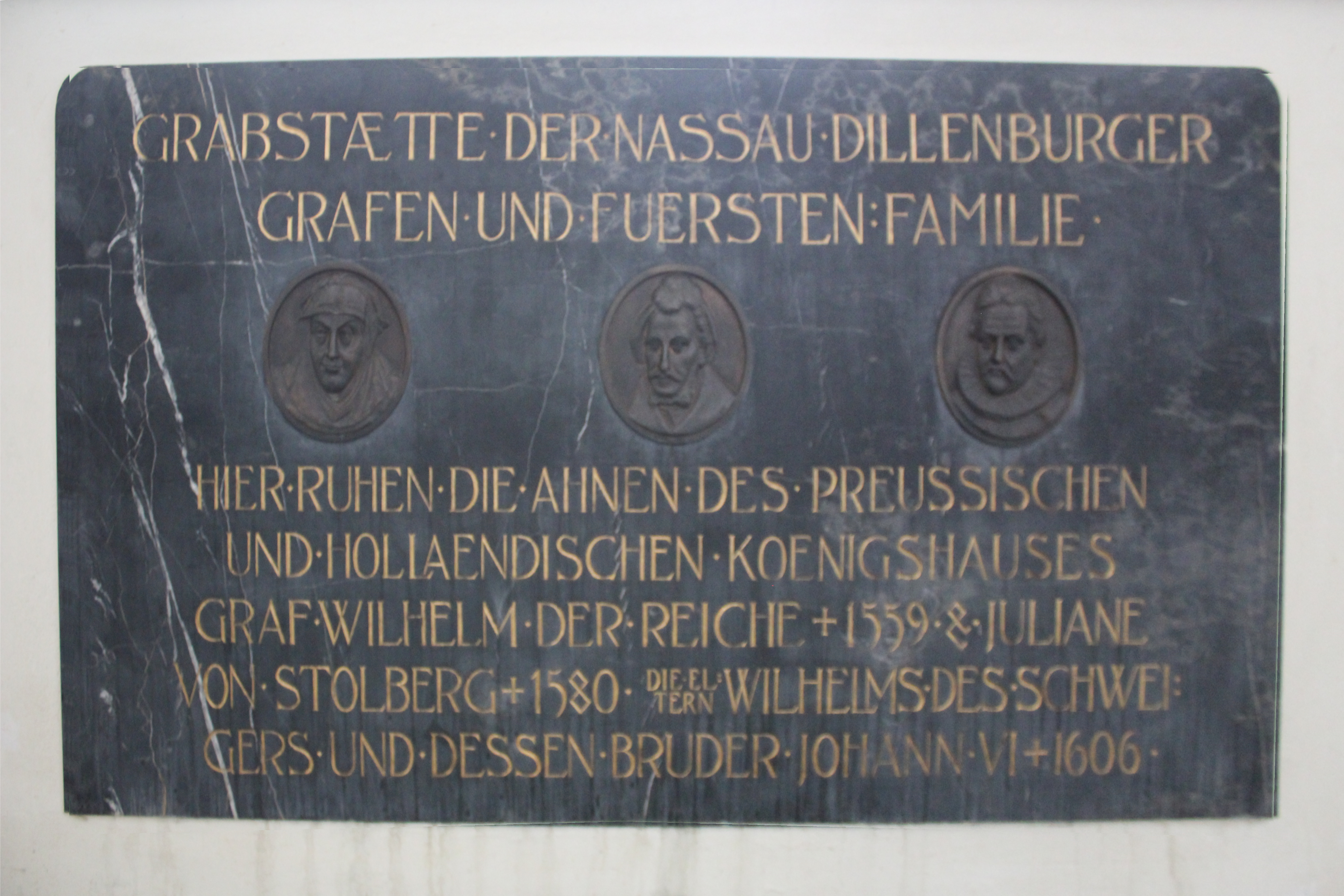 Evangelische Stadtkirche Dillenburg, Hessen, Deutschland